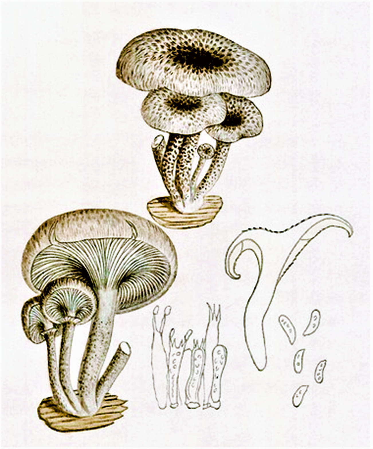 Giacomo Bresadola: Lentinus tigrinus (Bull., 1782) Fr. (1825)